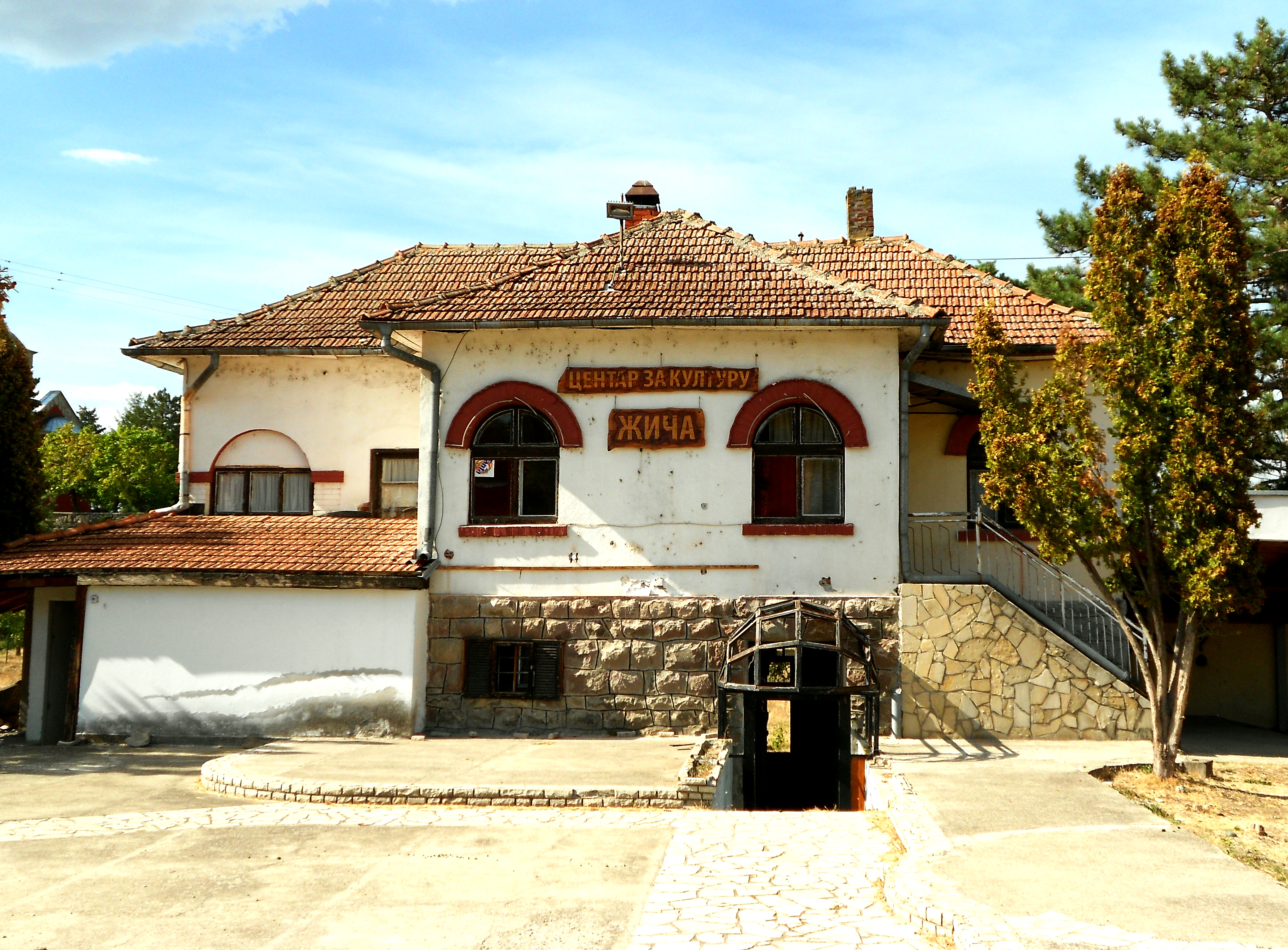 Centar za kulturu u blizini manastira